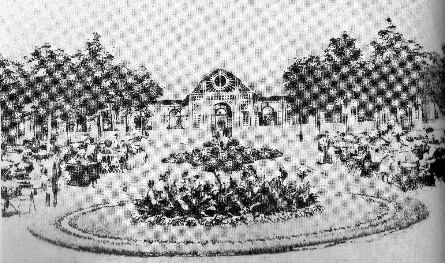 Tereny Wystawy Ogrodniczej w Poznaniu w 1907r.